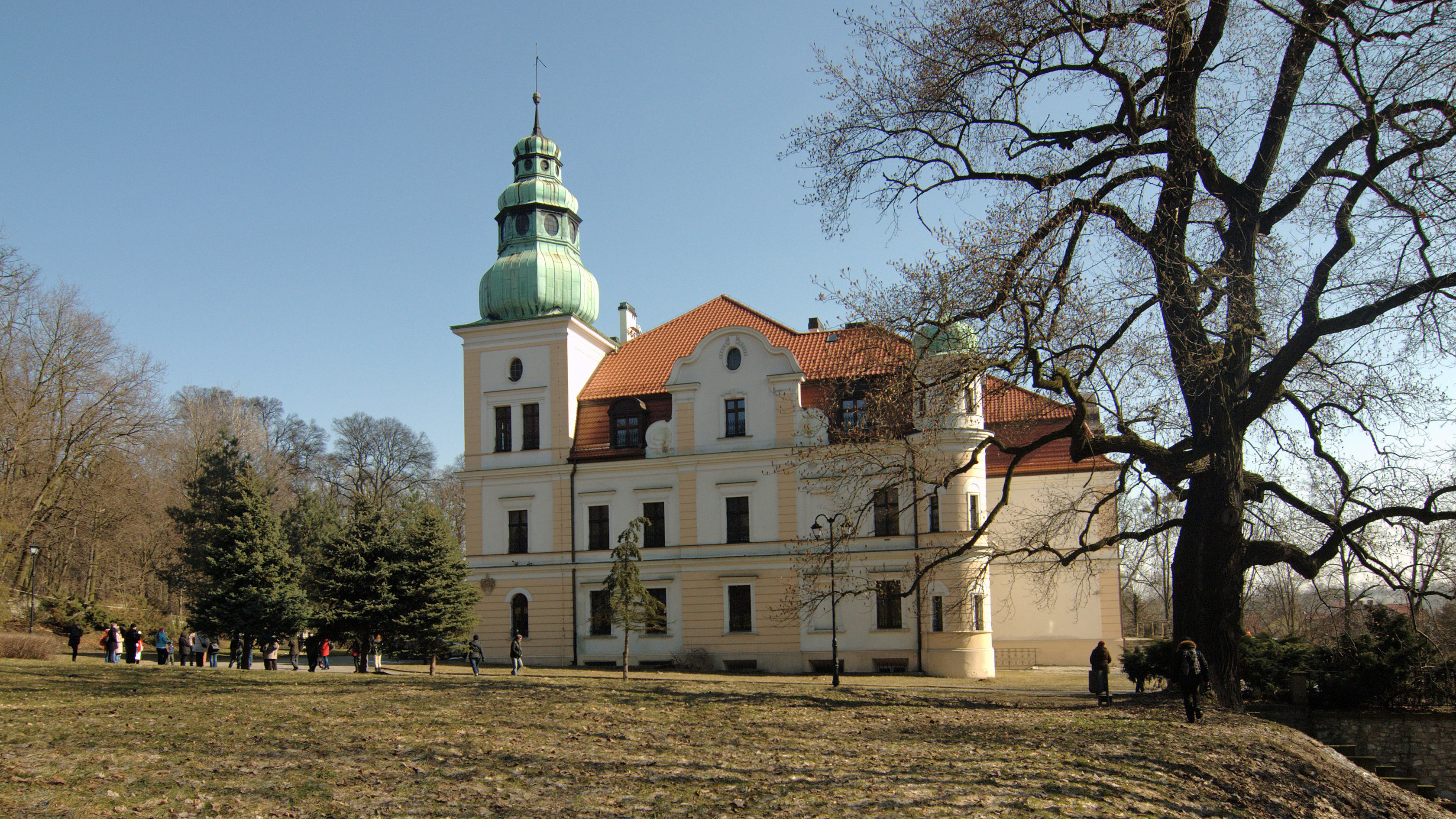 Pałac w Kamieńcu.